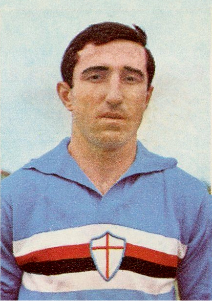 FIGURINA N.176 F. Francesconi ALBUM Panini CAMPIONI dello SPORT 1967/68